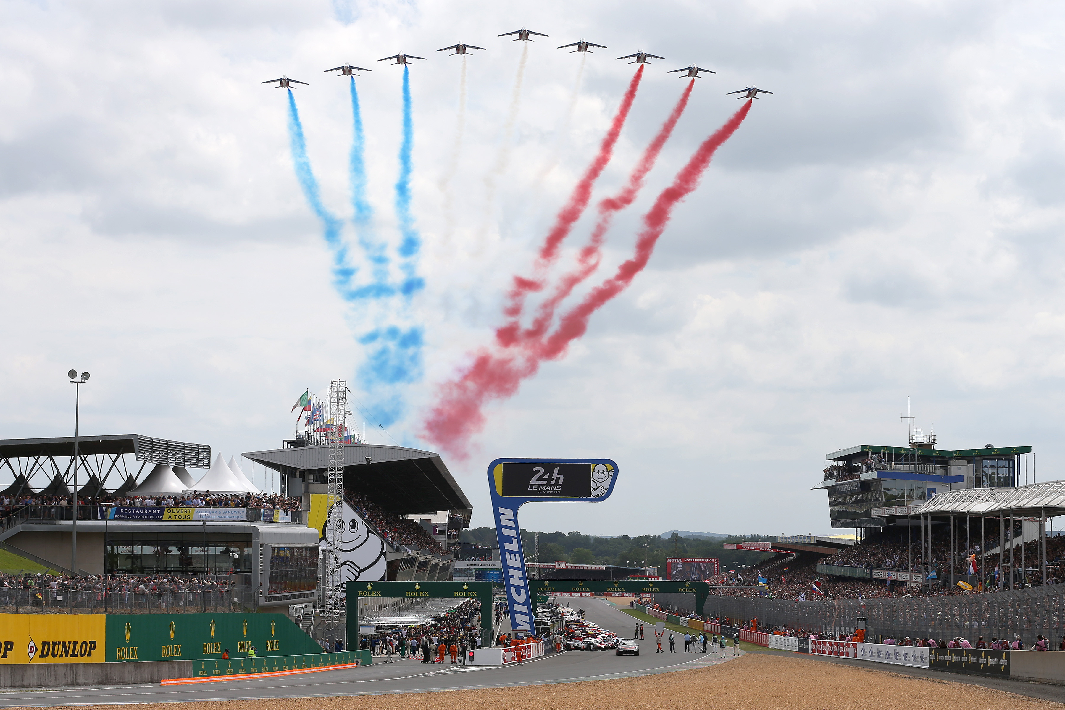 United Autosport lors des 24 Heures du Mans 2018.